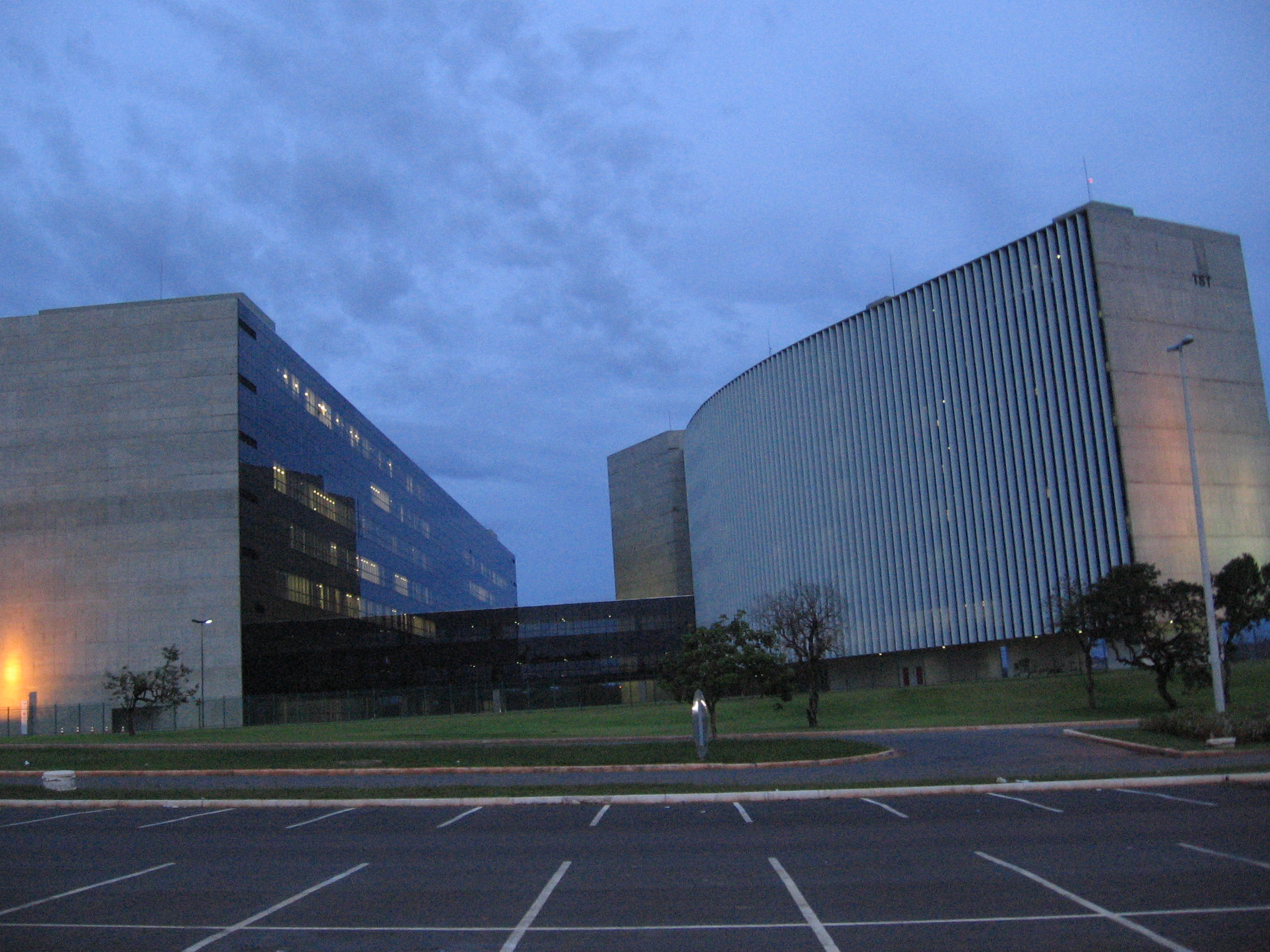 Vista externa da sede do Superior Tribunal de Justiça brasileiro.